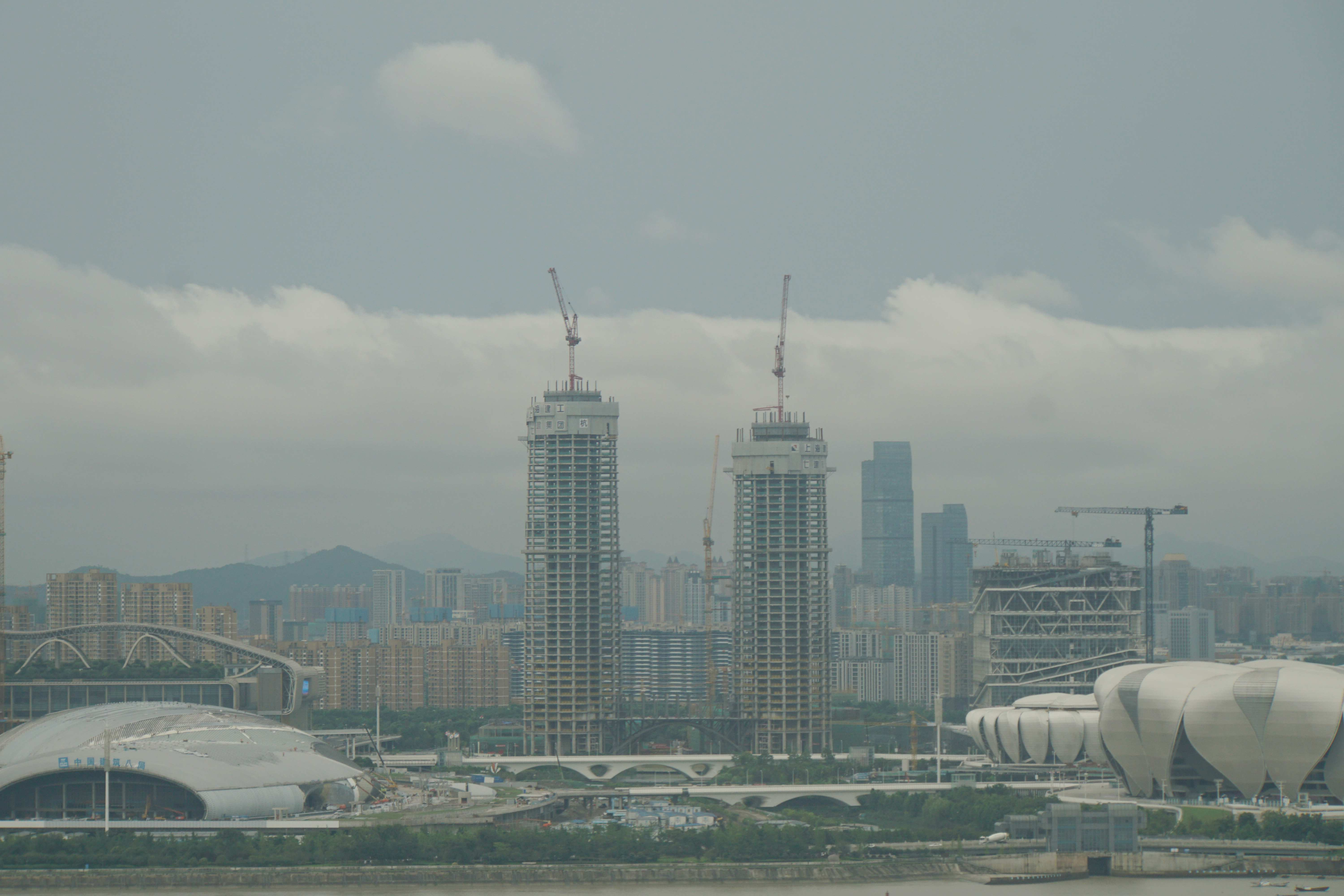 20200707建设中的杭州之门